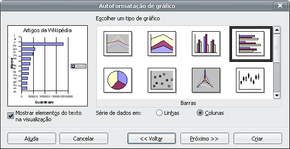 Assistente de criação de gráfico do em interface Windows camuflada